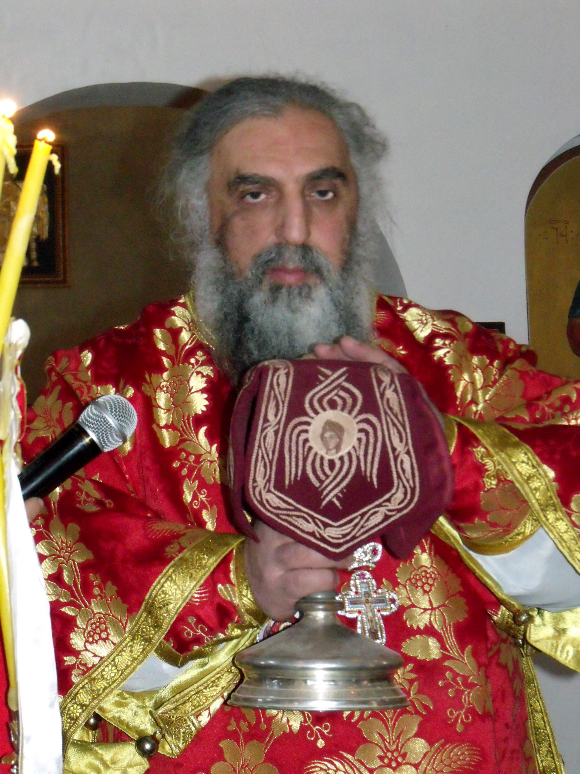 ცაგერისა და ლენტეხის ეპარქიის მღვდელმთავარი